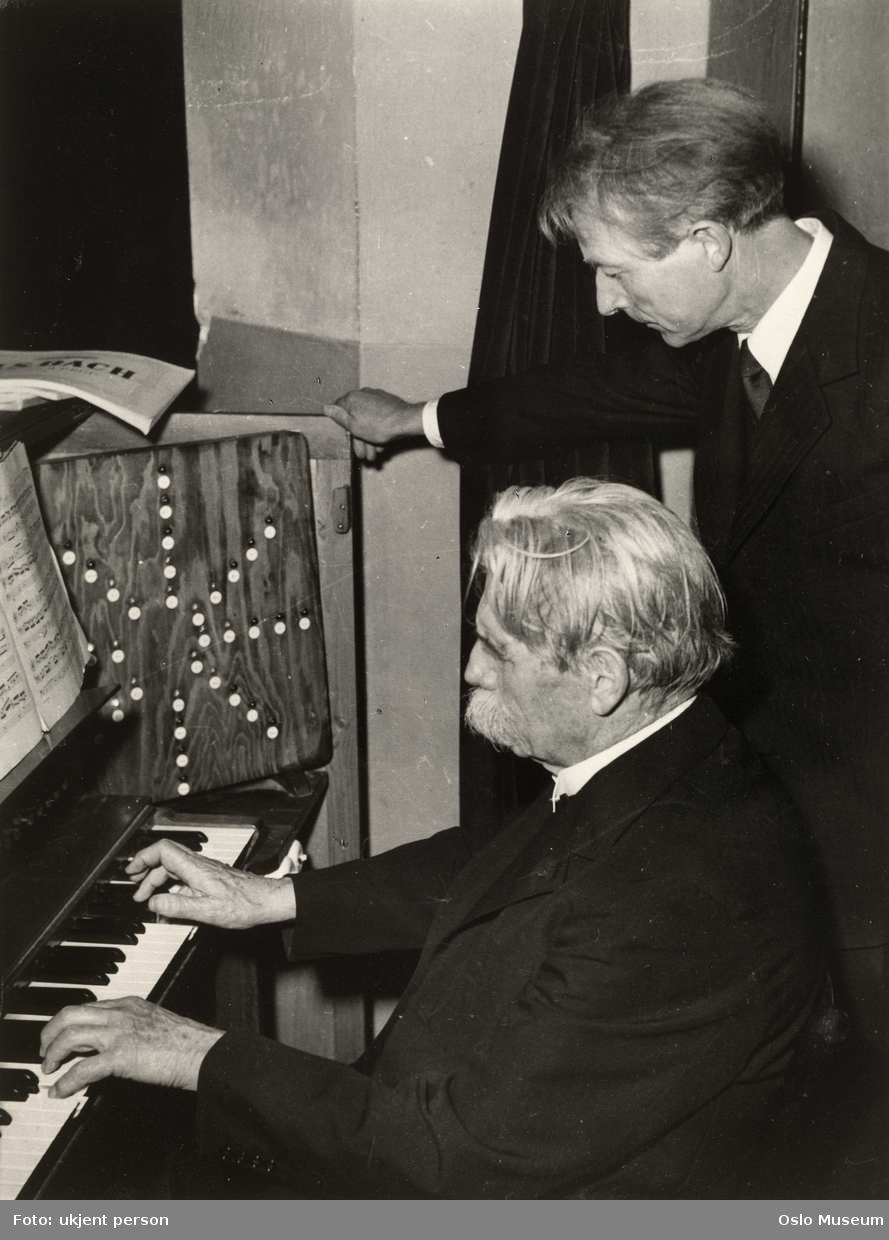 Eivind Groven og Albert Schweitzer. Ukjent fotograf (ca. 1950). Fra Byhistorisk samling hos Oslo Museum. Eivind Grovens renstemte orgel sto, da Scweizer prøvde det, på et av sidegalleriene i Trefoldighetskirken. (Denne hadde hvitkalkede vegger frem til på 1960-tallet.) Det rapporteres at Schweizer ikke var veldig interessert, fordi orglet hadde bare ett register, og han vendte seg raskt videre til Claus Jensen-orglet på hovedgalleriet.